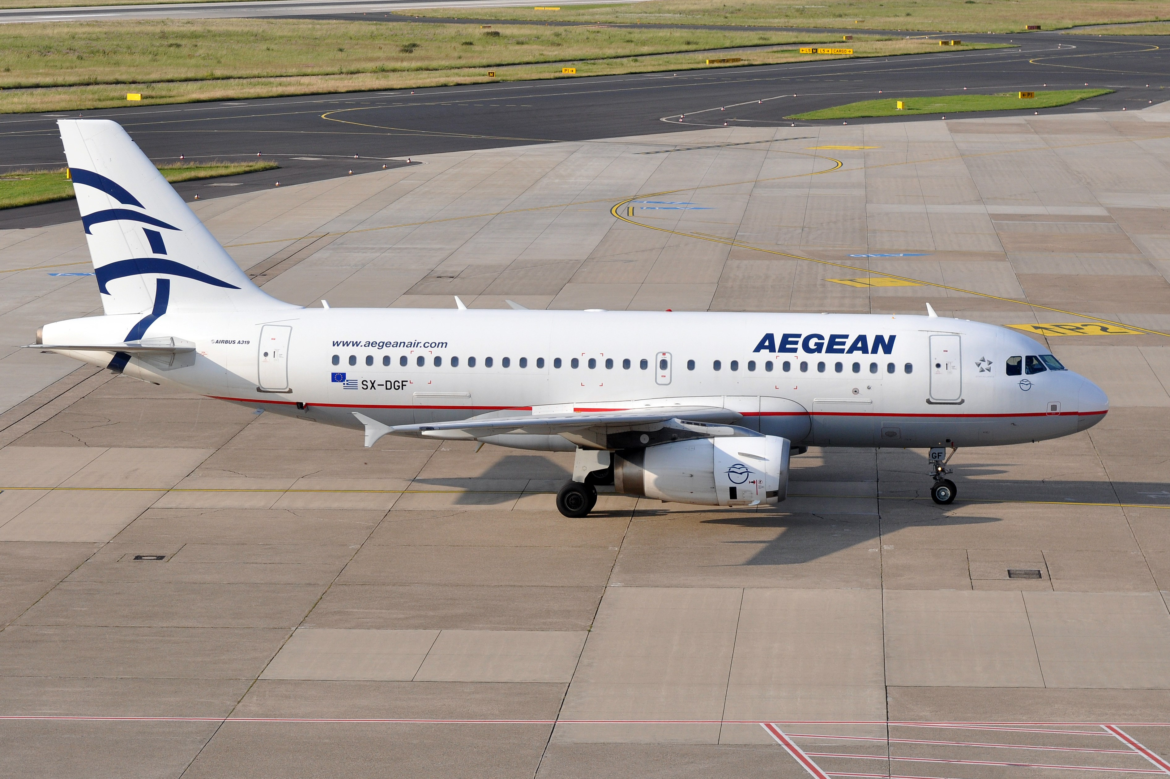 MSN 2468 A319-132 AEGEAN AIRLINES DUS EX INDEPENDENCE AIR AS N815BR / AIR BERLIN AS D-ABGC